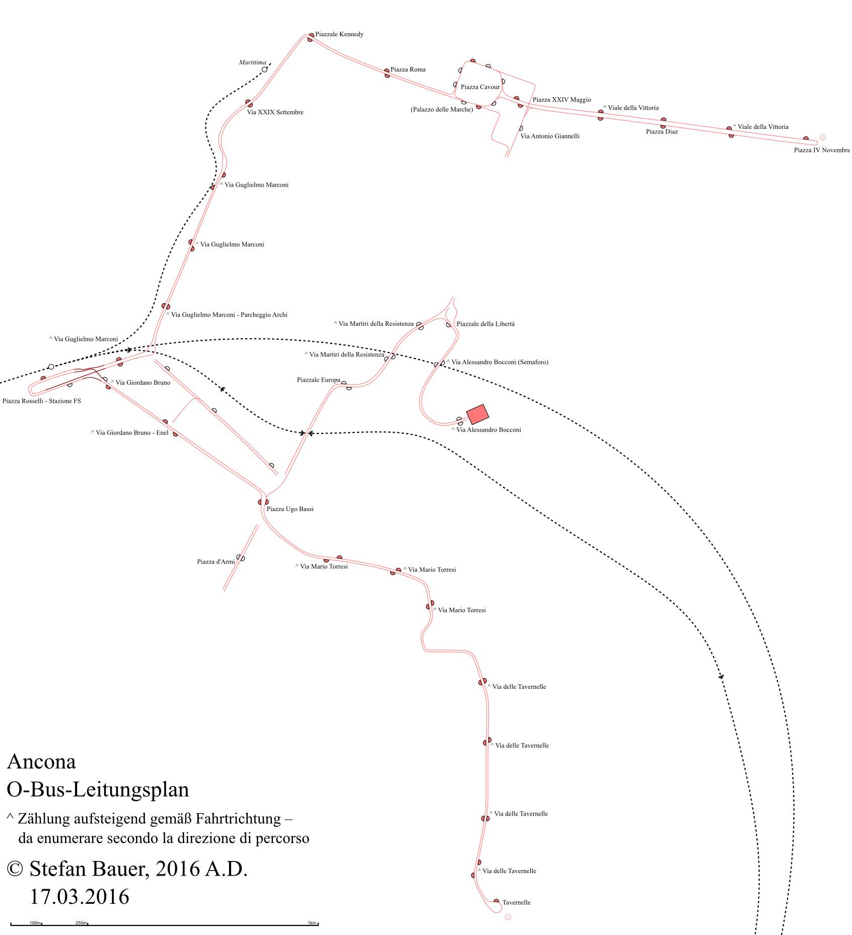 Mappa dei bifilari del filobus di Ancona 2016